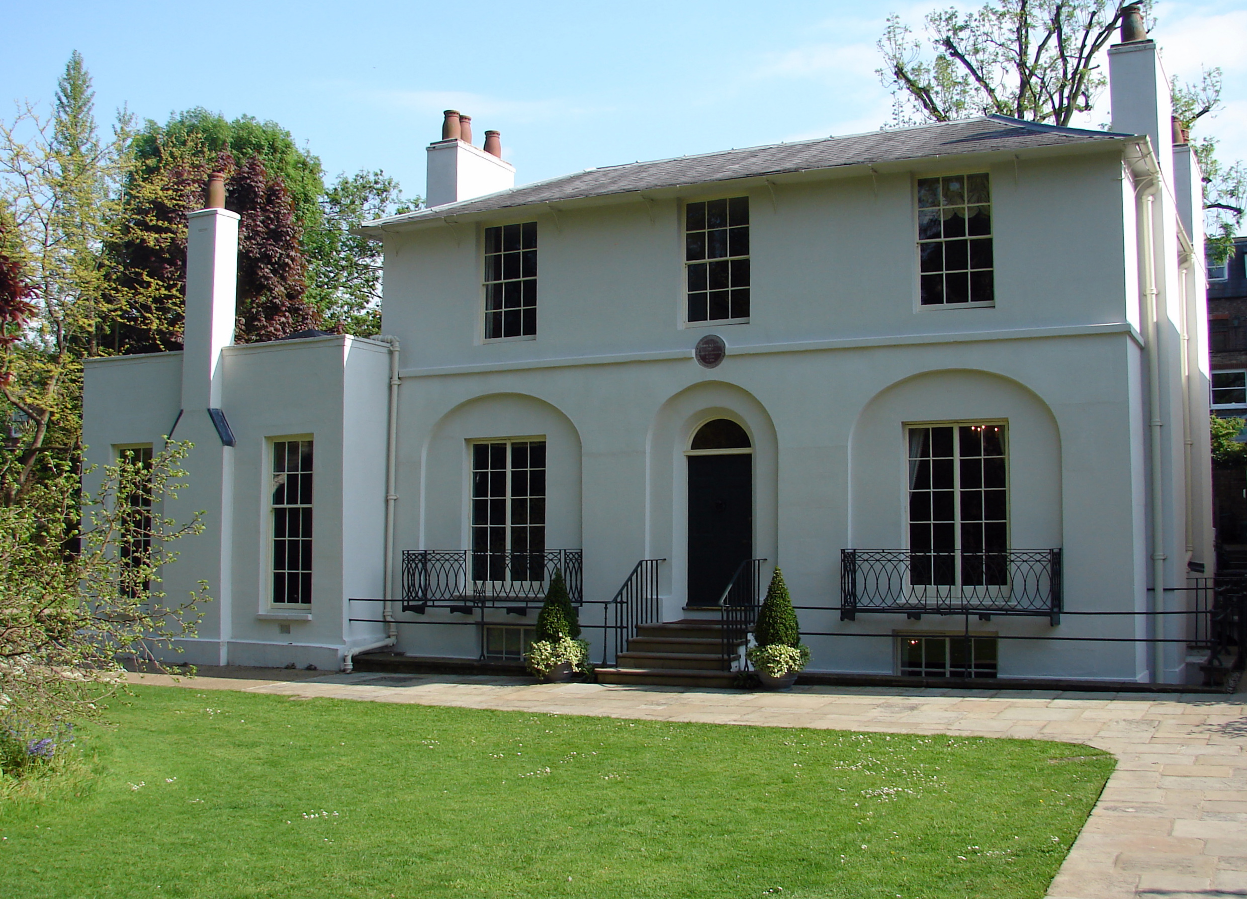 John Keats